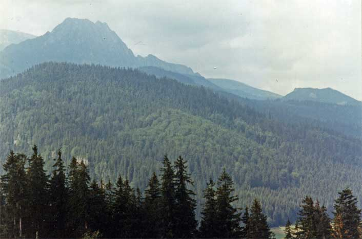 Foto gemaakt augustus 1993 (gedigitaliseerd 28 november 2006).